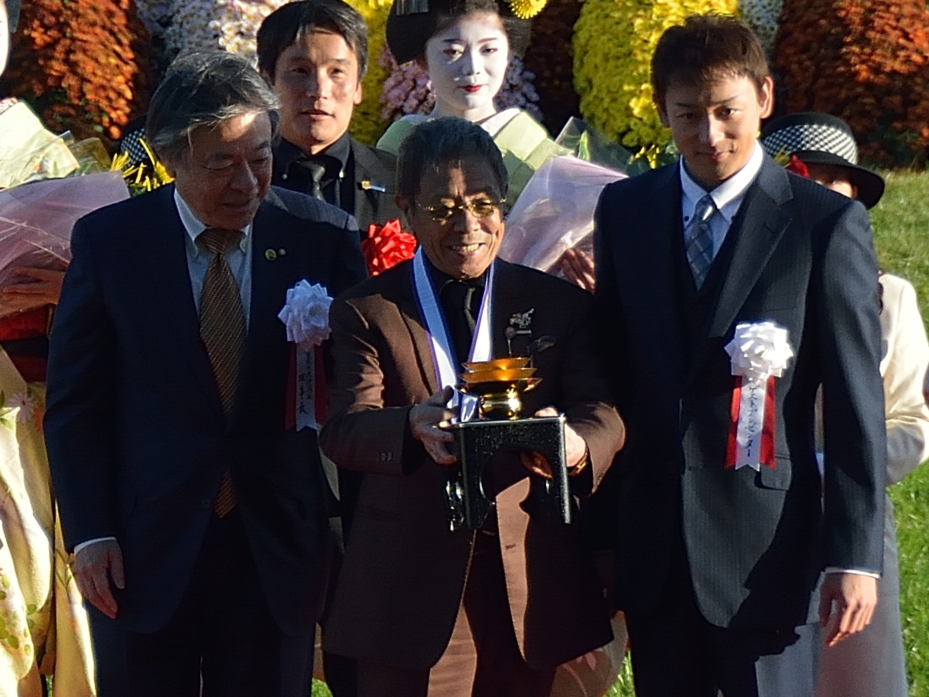 2015年10月25日に京都競馬場で行われた「第76回菊花賞」の表彰式で、金杯が贈呈された場面を、観客席から撮影したもの。金杯が贈呈された中央の人物は、勝利馬キタサンブラックの馬主である北島三郎。北島の右隣の人物は菊花賞のゲストプレゼンターを務めた山本耕史。北島の左隣の人物はJRAの後藤正幸理事長。